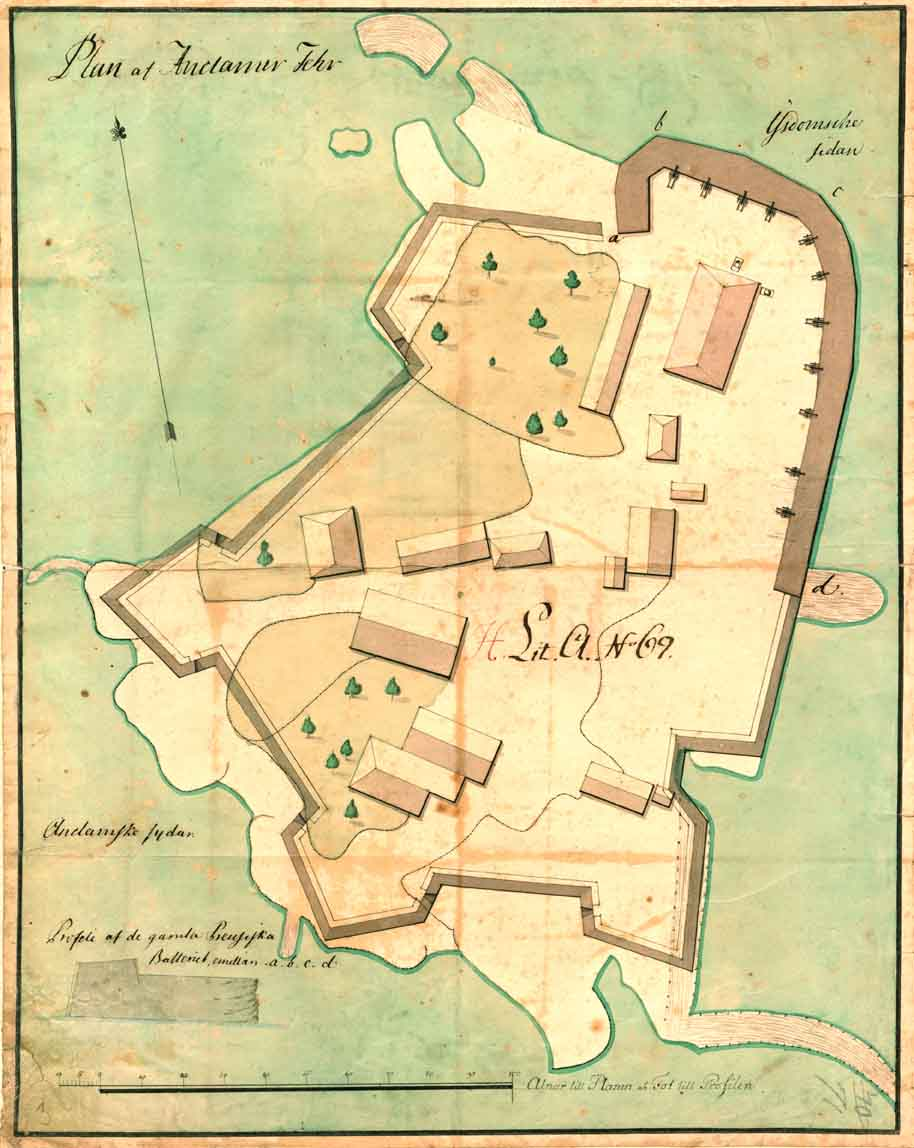 Citymap of Anklamer Fähre im Jahr 1757